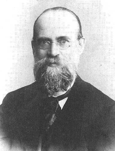 Русский философ, профессор Лев Михайлович Лопатин